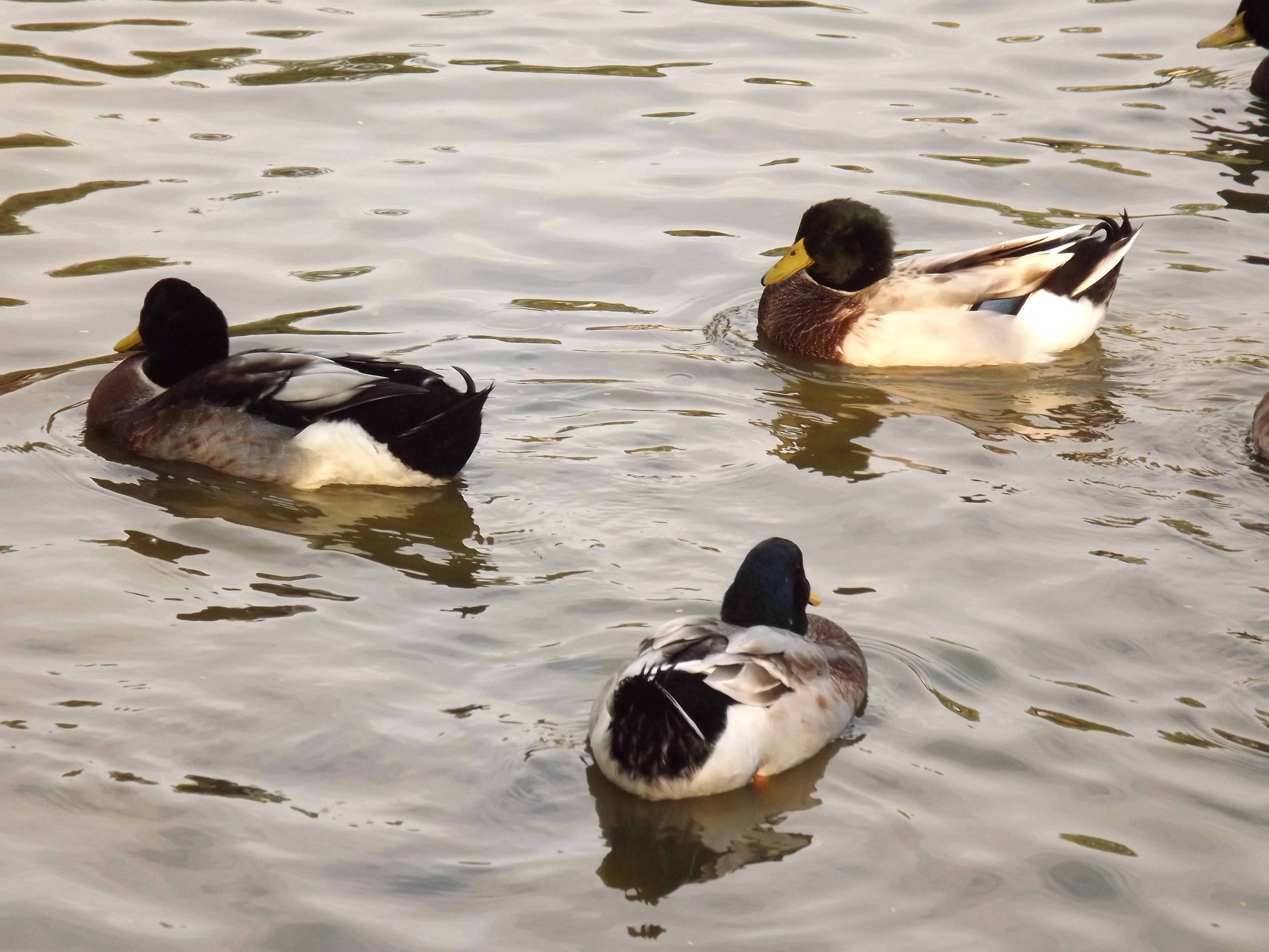 حديقة حيوان النزهة - الاسكندرية